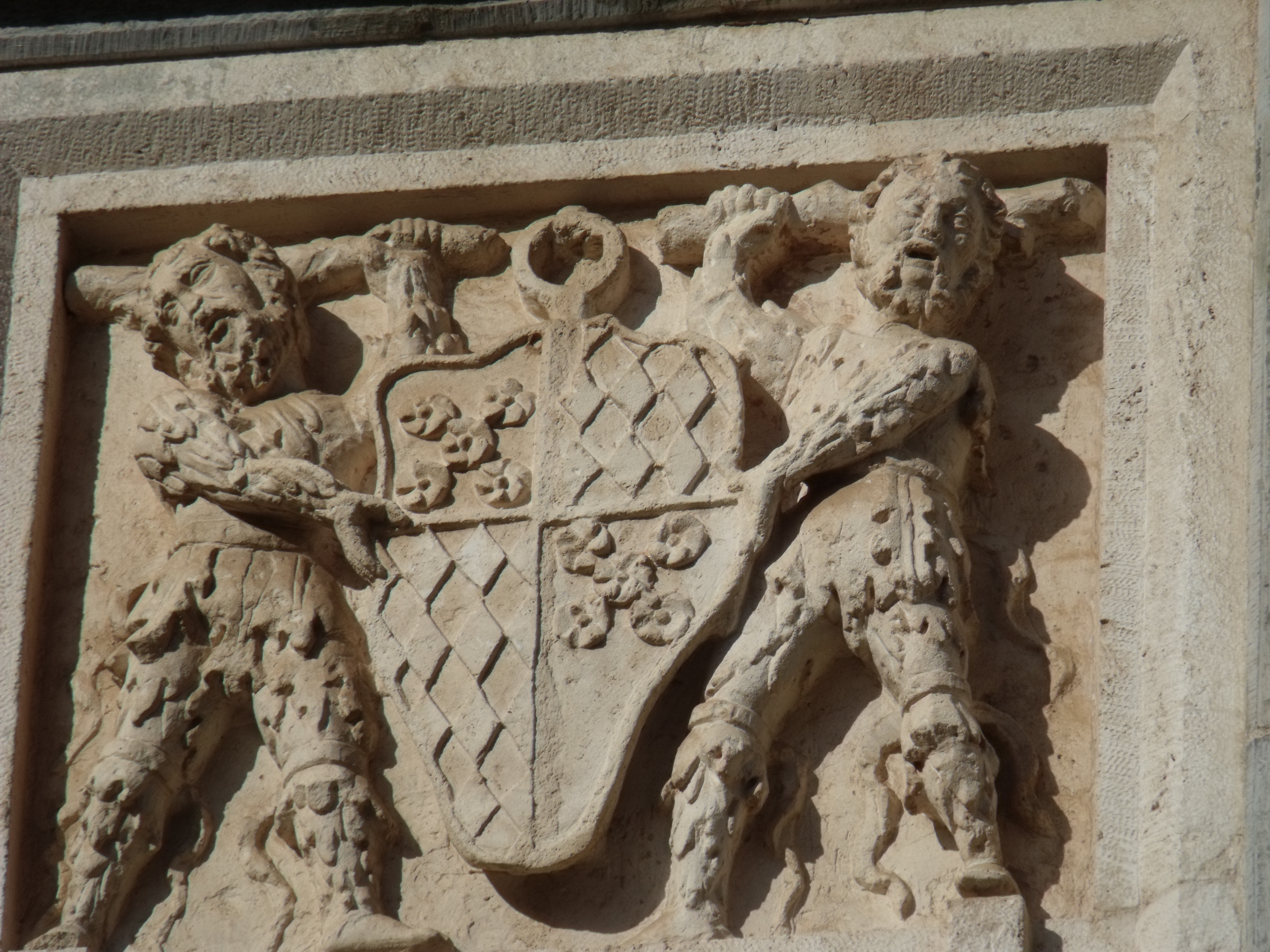 Escudo del Palacio Condal de Faura. Este elemento es bien de interés cultural.